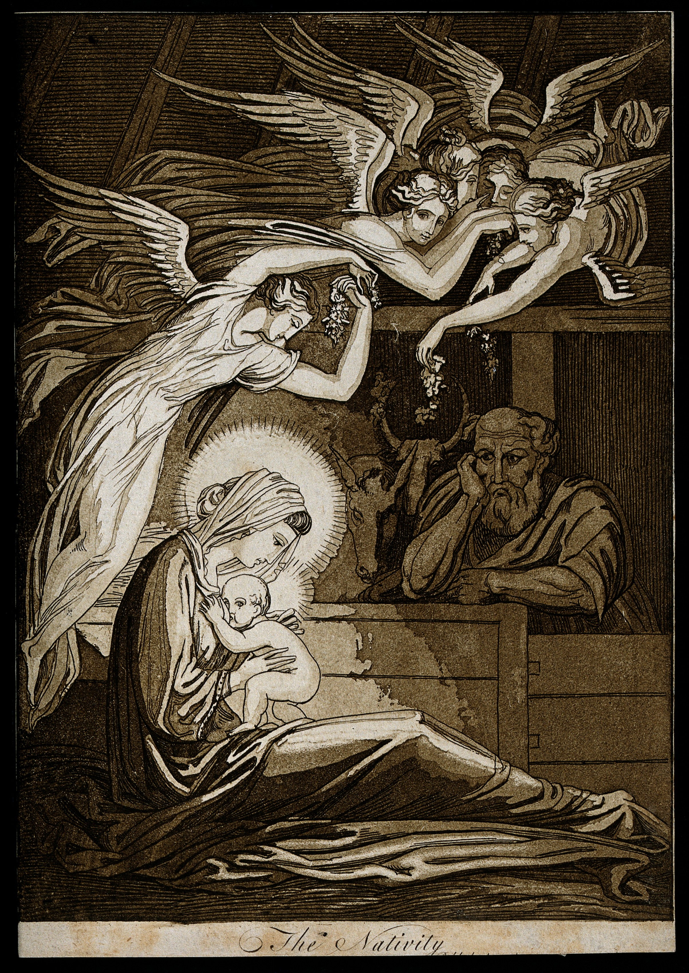 Aquatinte. L'Enfant-Jésus tète Sa Mère, sous le regard de saint Joseph et d'anges aux traits féminins.